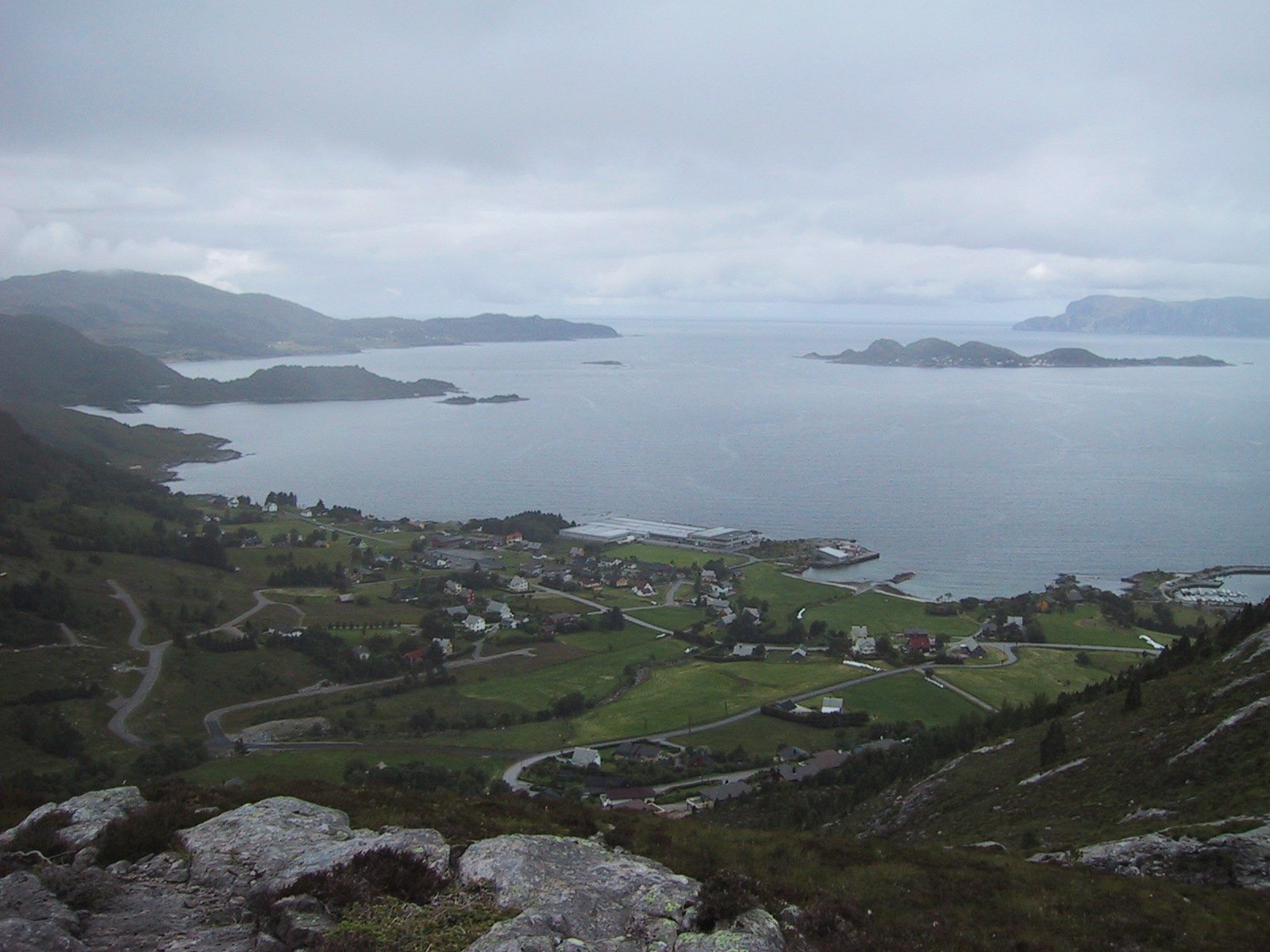 Bildet kan fritt brukes mot Referanse, foto: Arne Ødegård, Utsikt til Flatraket, mot nord-vest.